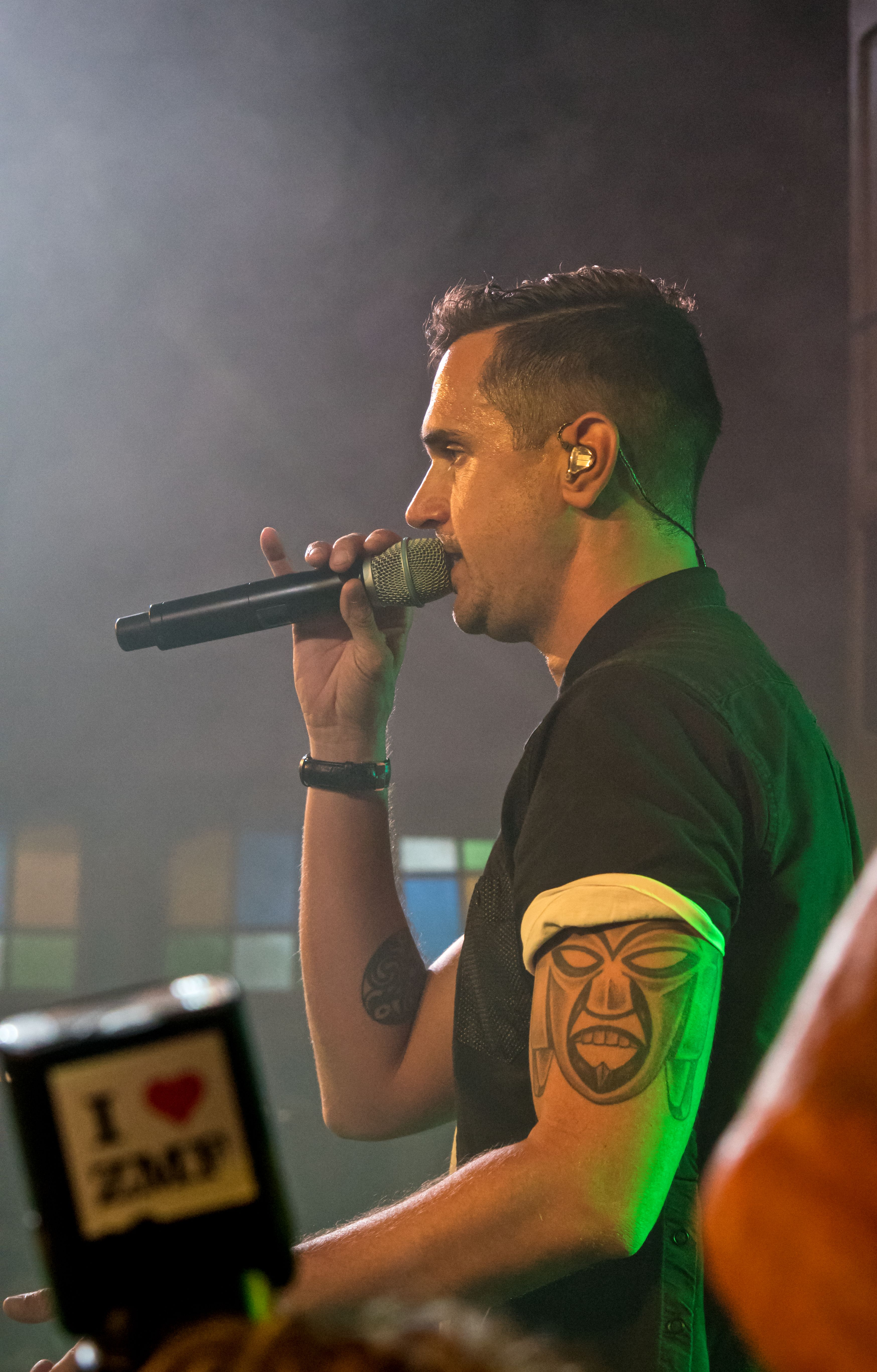 Bilder vom Zelt Musik Festival 2016 in Freiburg im Breisgau Der Sänger Seven mit seiner Band